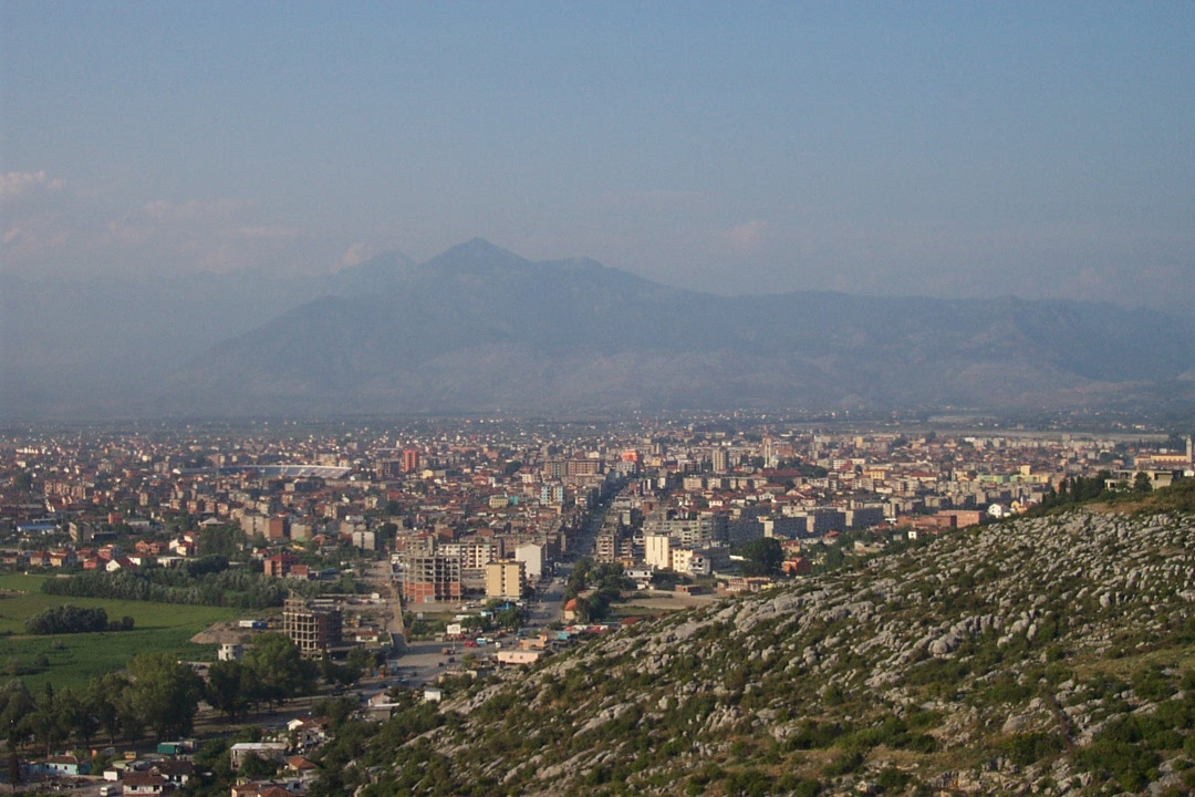 Pohled na město Skadar v Albánii z ptačí perspektivy